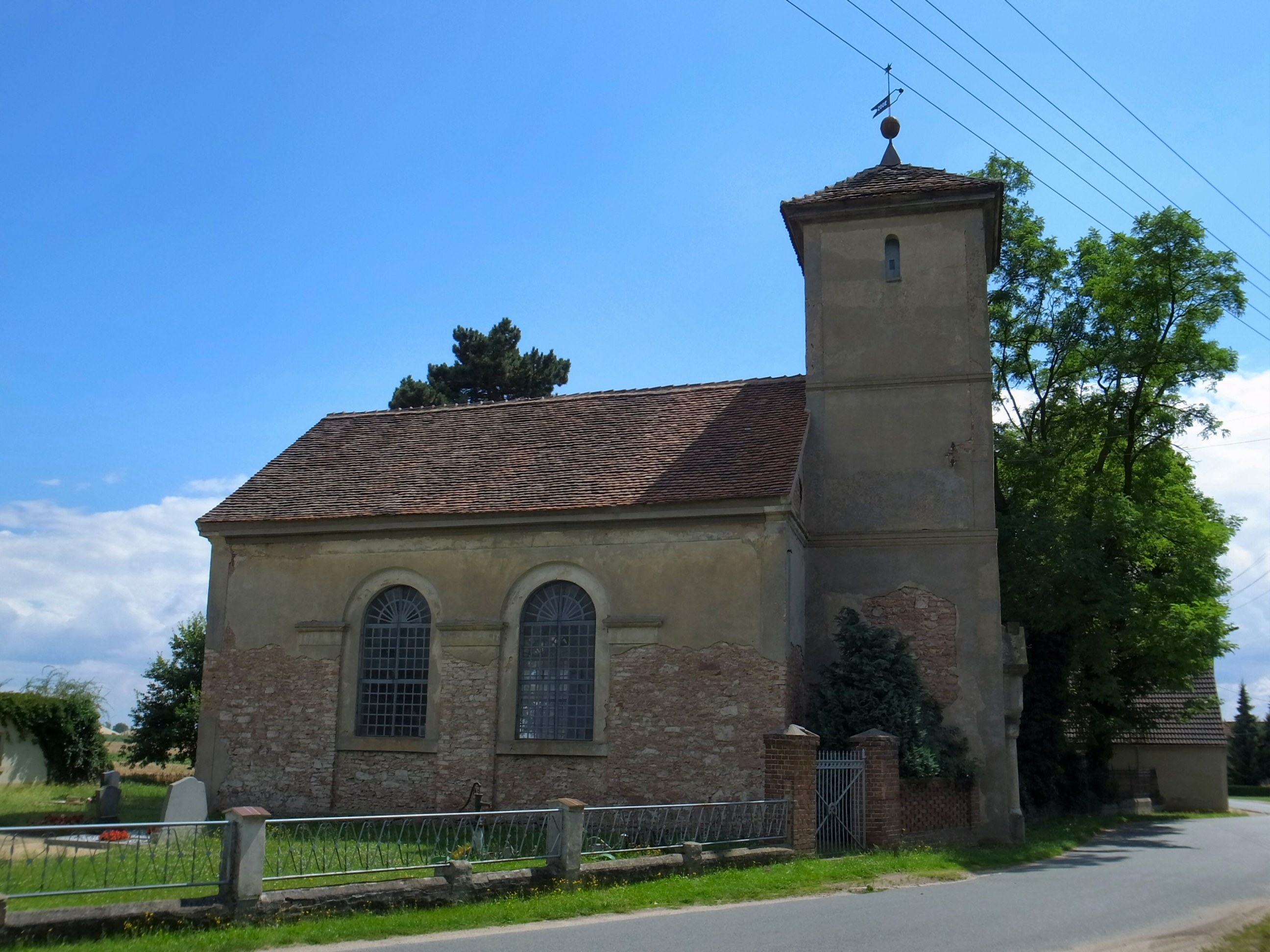 evangelische Kirche Pösigk